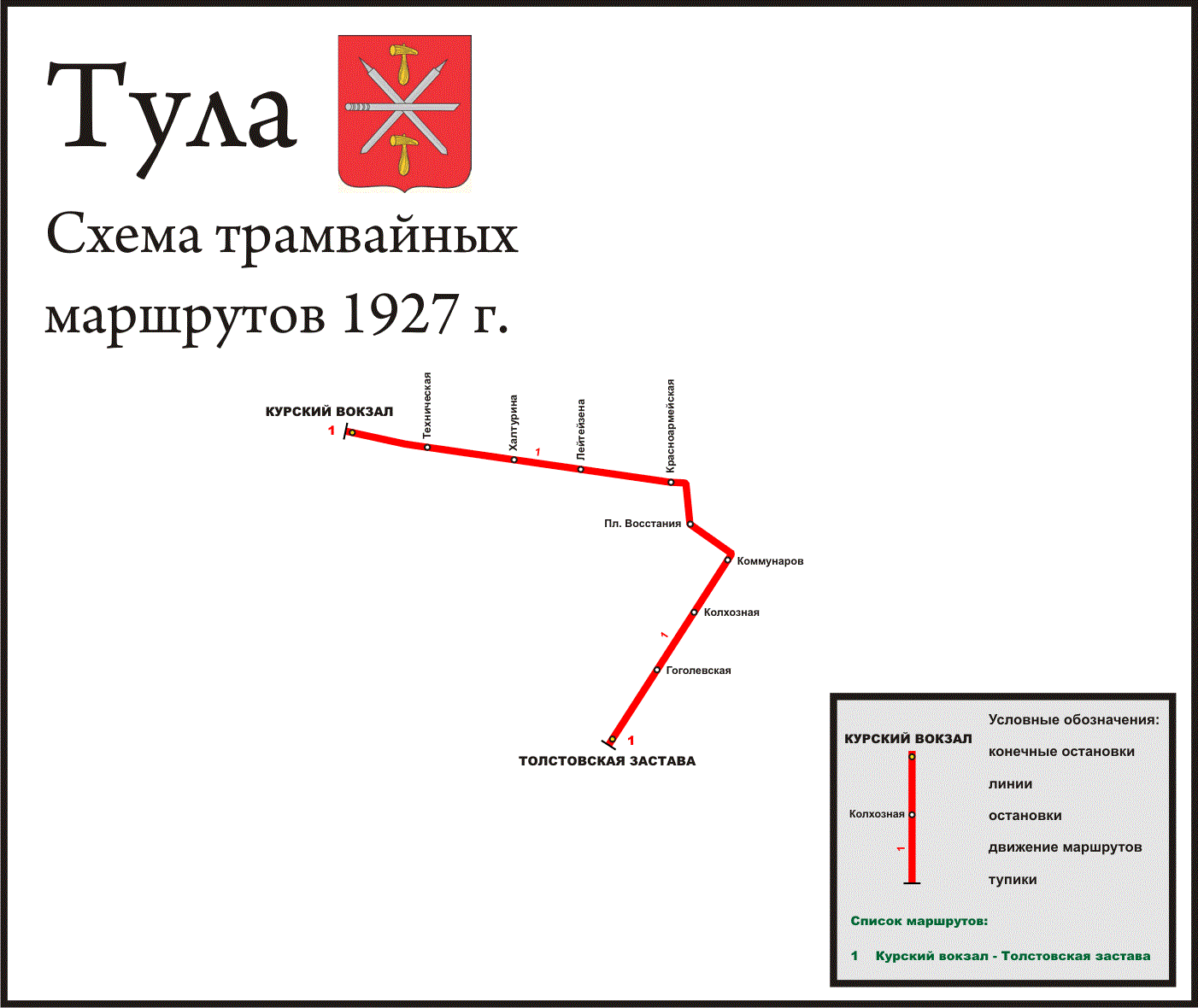 Схема пускового участка тульского трамвая